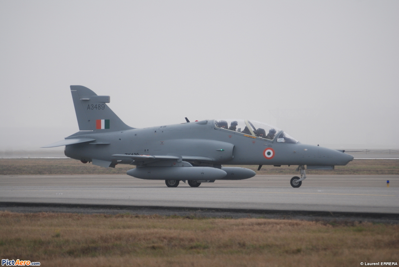 Photo prise à l'aéroport de Toulouse-Blagnac (LFBO) en France. Picture take at Toulouse-Blagnac Airport (LFBO) in France.